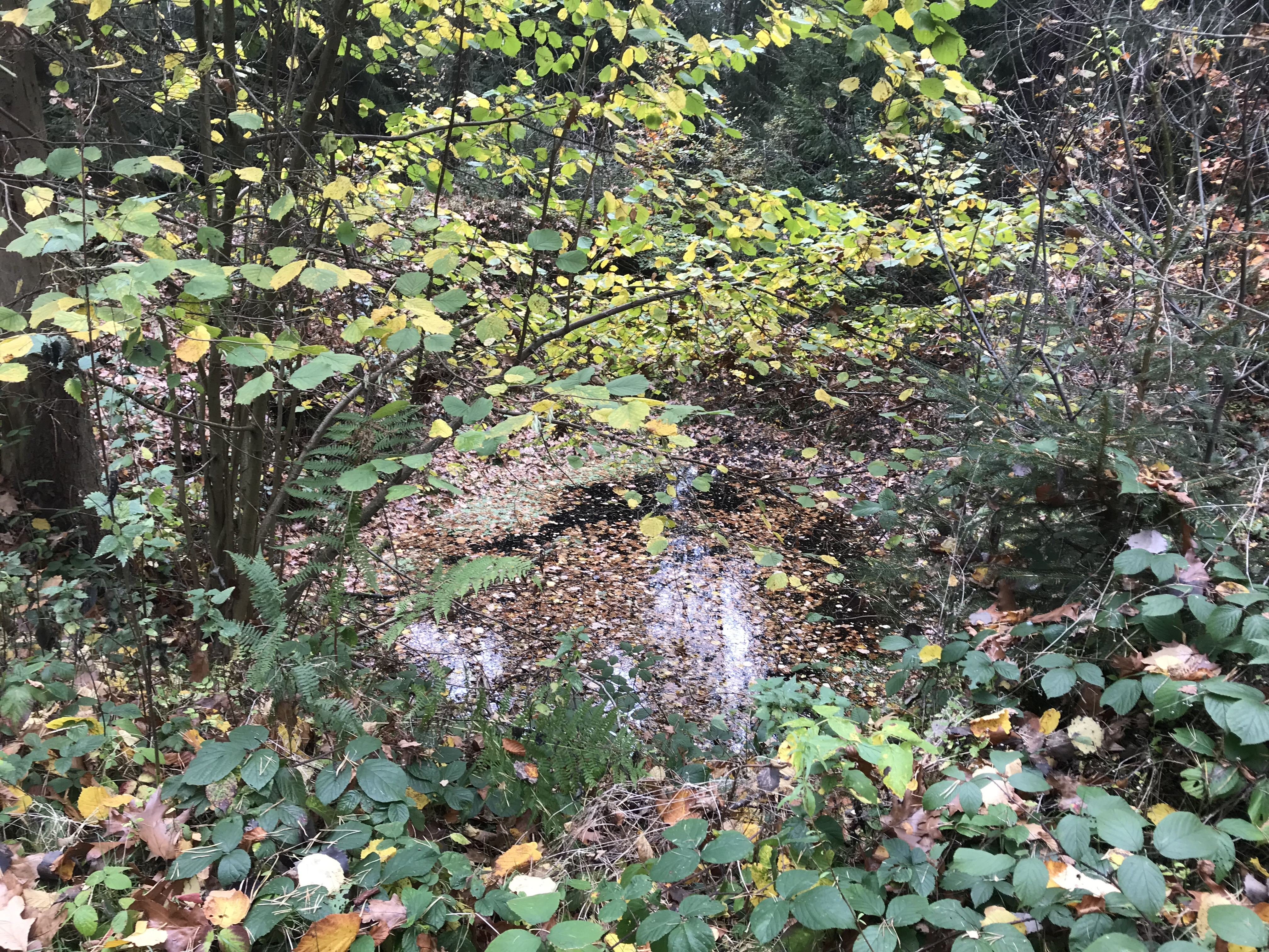 Hechtlöcher ( mit Wasser gefüllte Lichtlöcher des Römerstollen) 2017